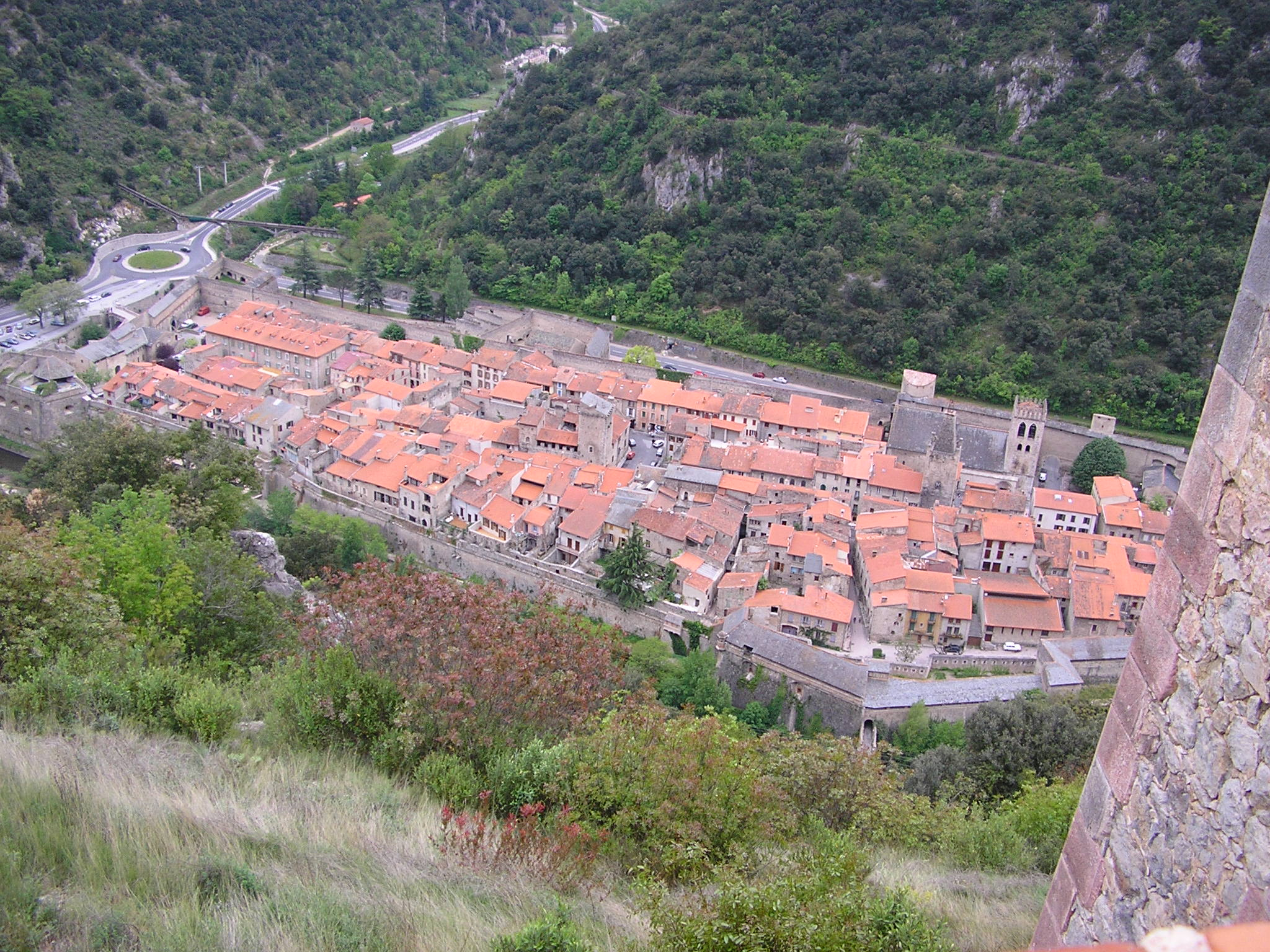 Vilafranca de Conflent vista des de Fort Libèria. Source: Makinal